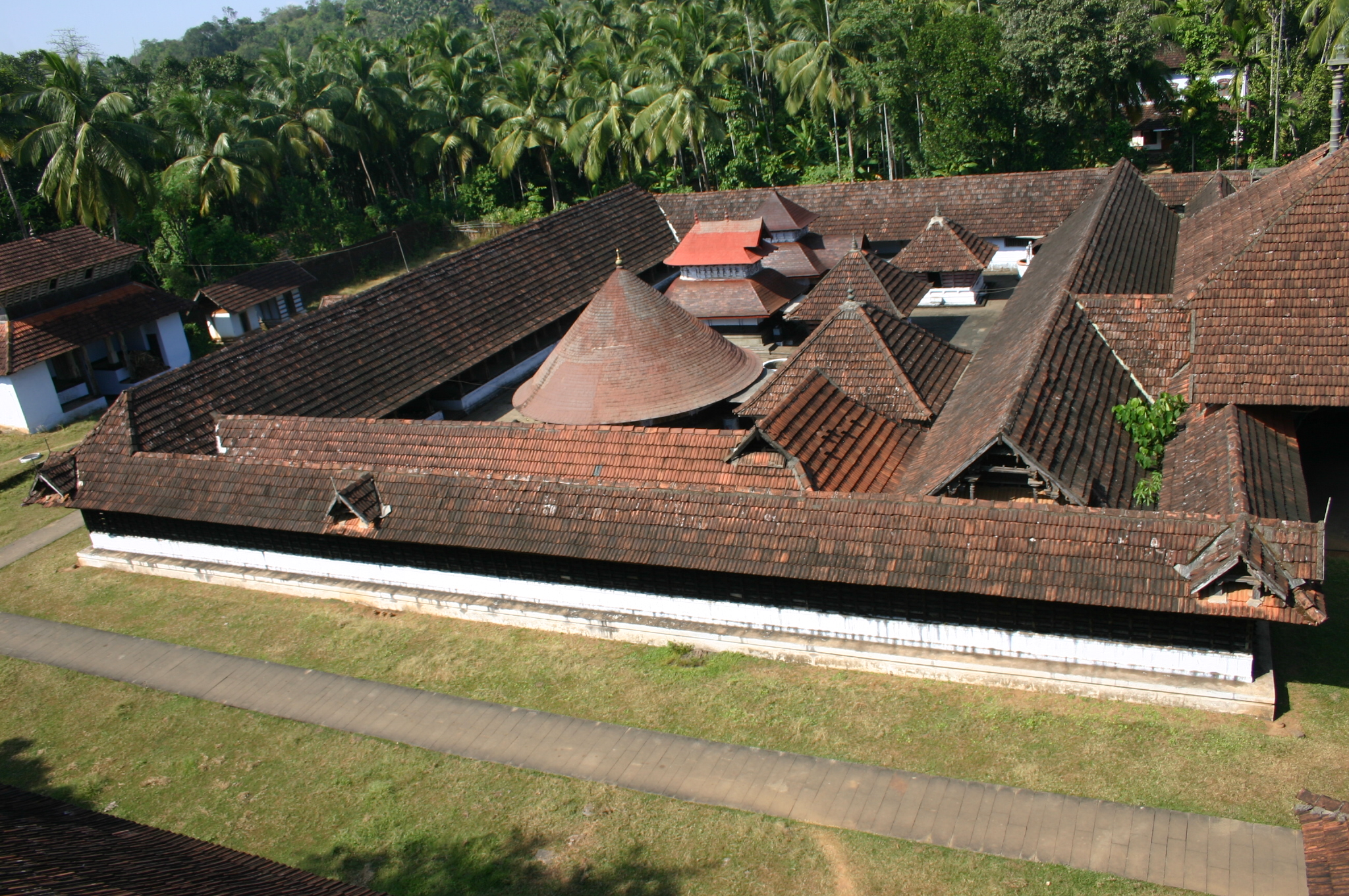 തിരുവേഗപ്പുറ ശ്രീമഹാക്ഷേത്രം-ആകാശവീക്ഷണം